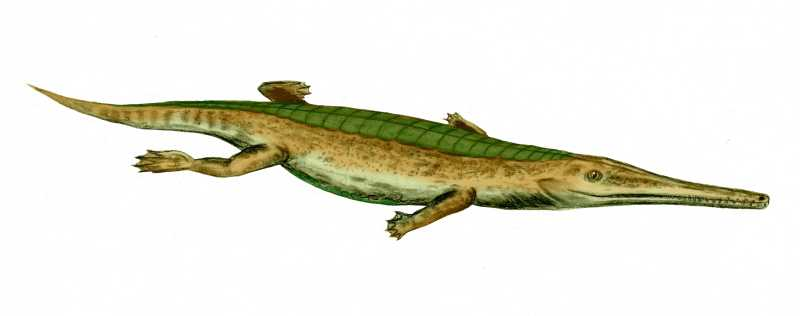 Pelagosaurus, pencil drawing